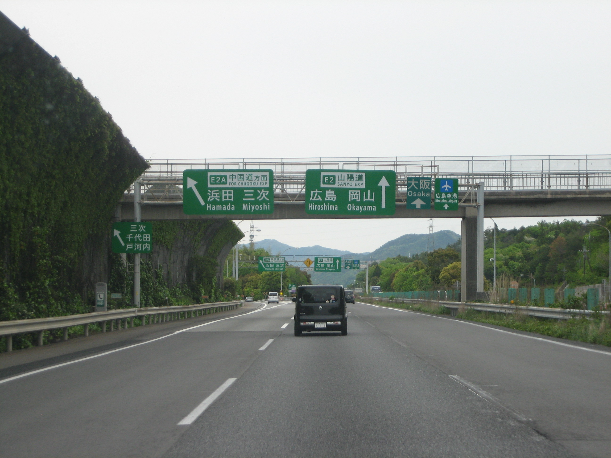 広島JCT